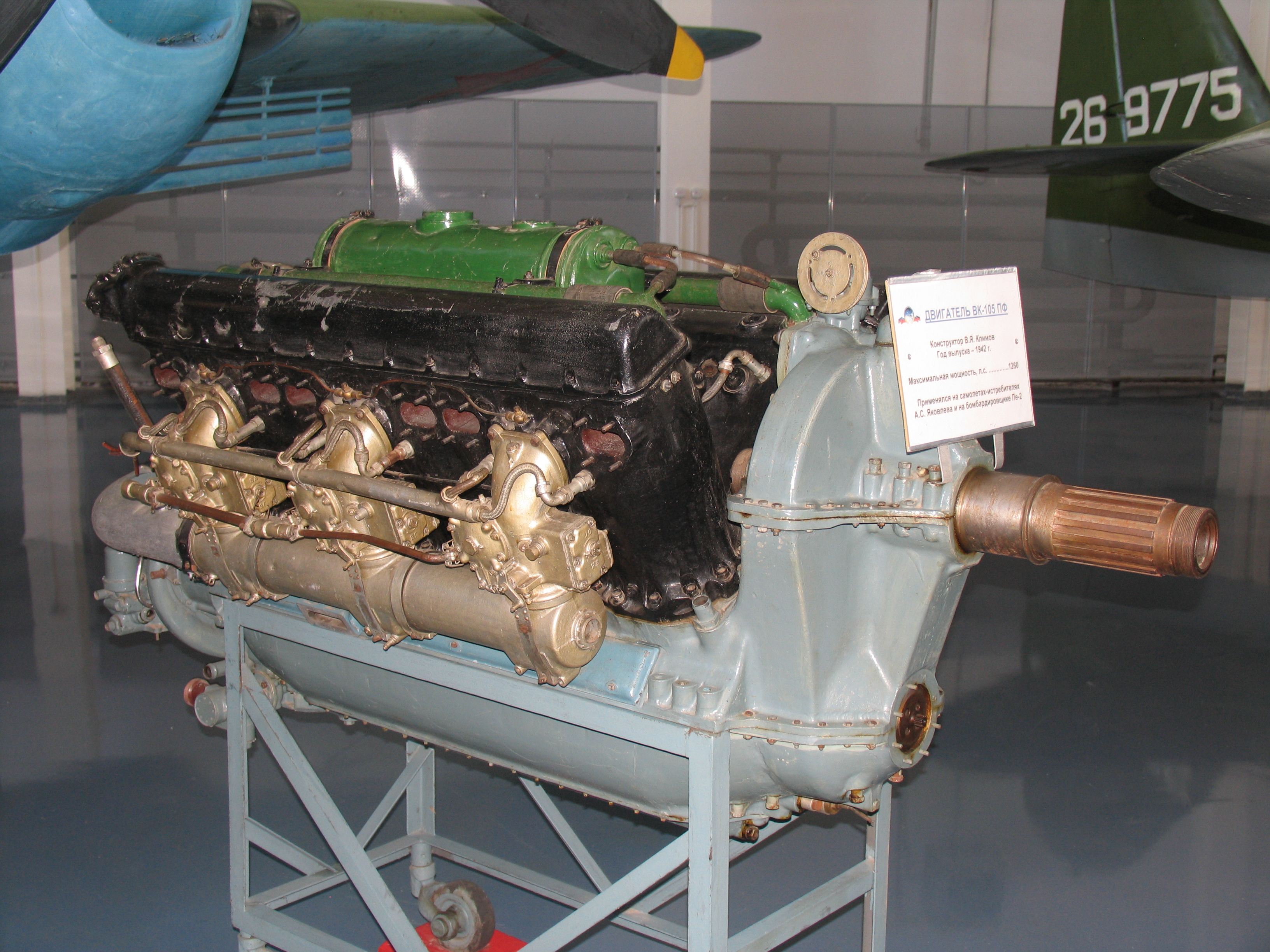 Двигатель ВК-105ПФ (М-105ПФ). Музей ВВС.